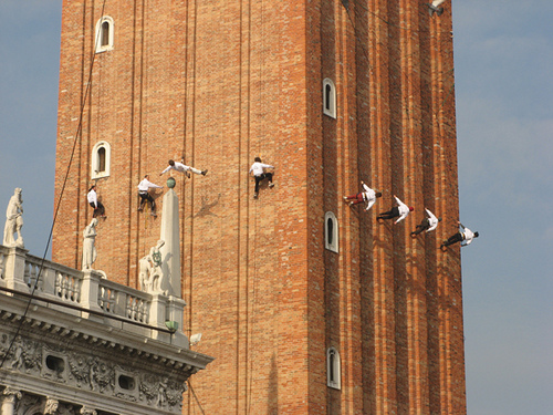 Il Posto Vertical Dance Company, San Marco, Carnevale di Venezia 2007